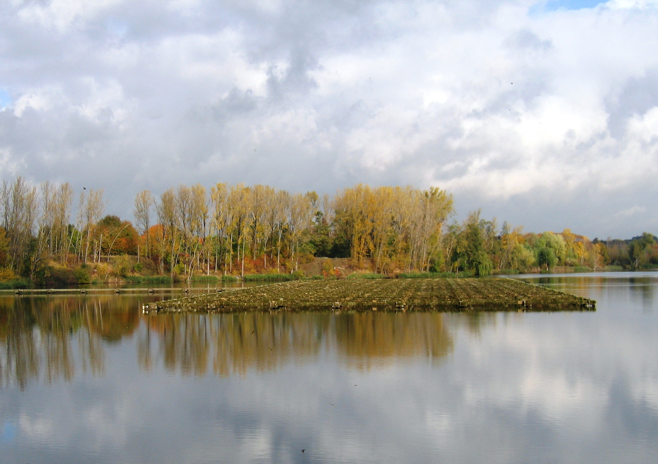 Ehemalige Kühlanlage für das Kraftwerk Wölfersheim im Wölfersheimer See.